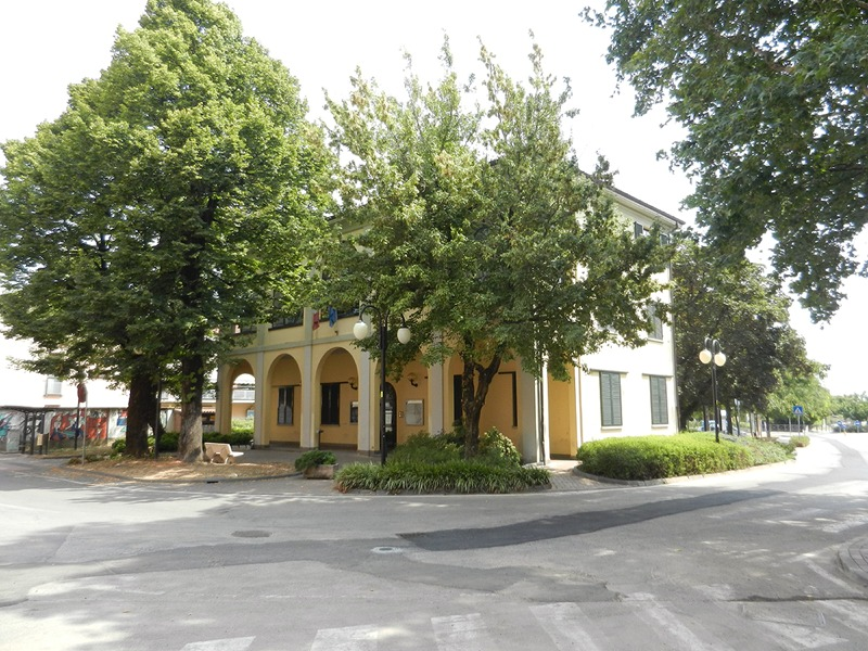 Trezzano Rosa - Municipio